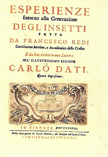 Frontcover of Esperienze intorno alla Generazione degli Insetti by Francesco Redi (1687)